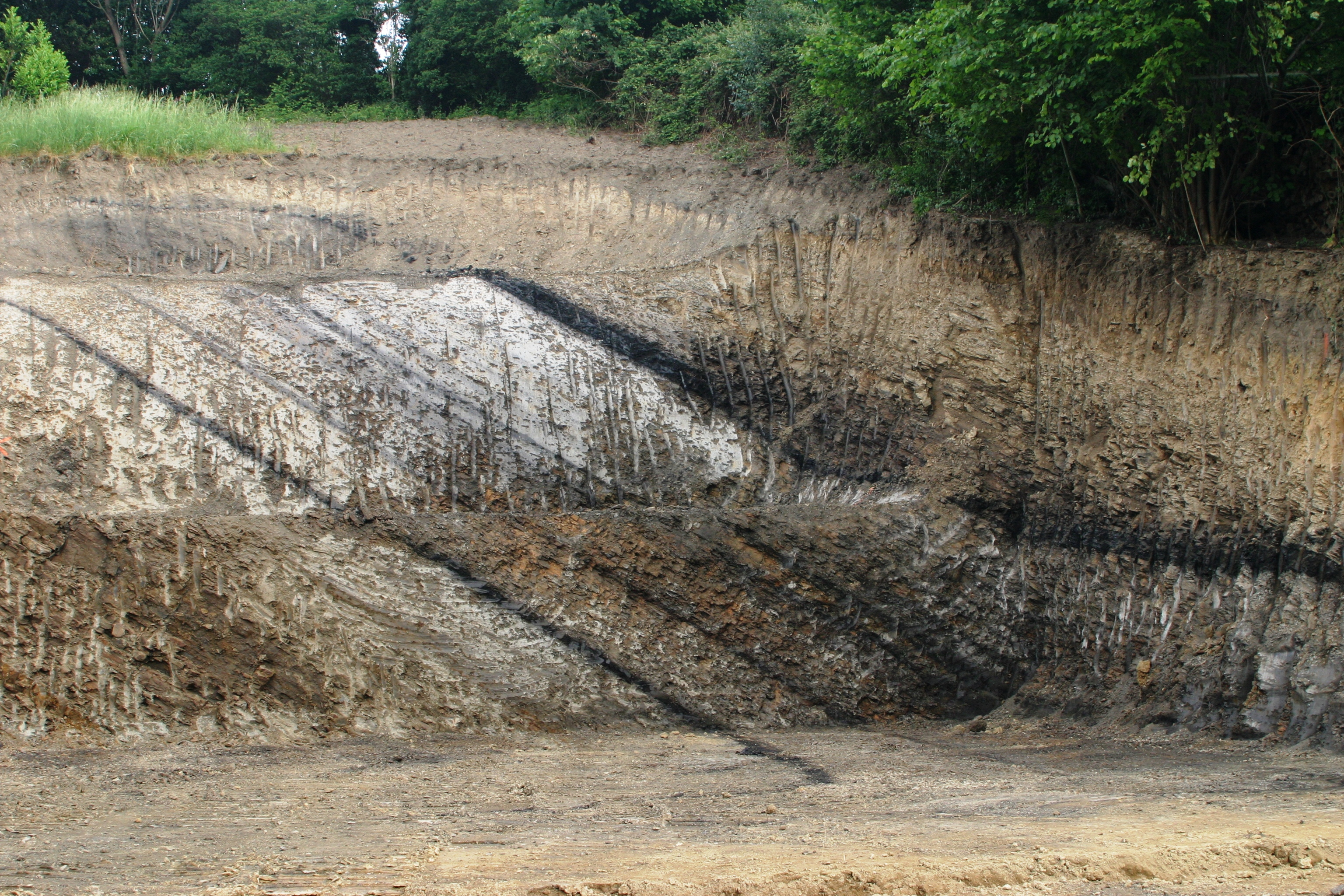 En Uschnëtt op enger Bauplaz zu Bellaire op deem d'Kueleschichten am Leem ze gesi sinn.